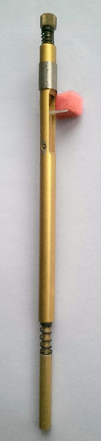 Mit Stellschrauben oben und unten kann die Auslösung reguliert werden